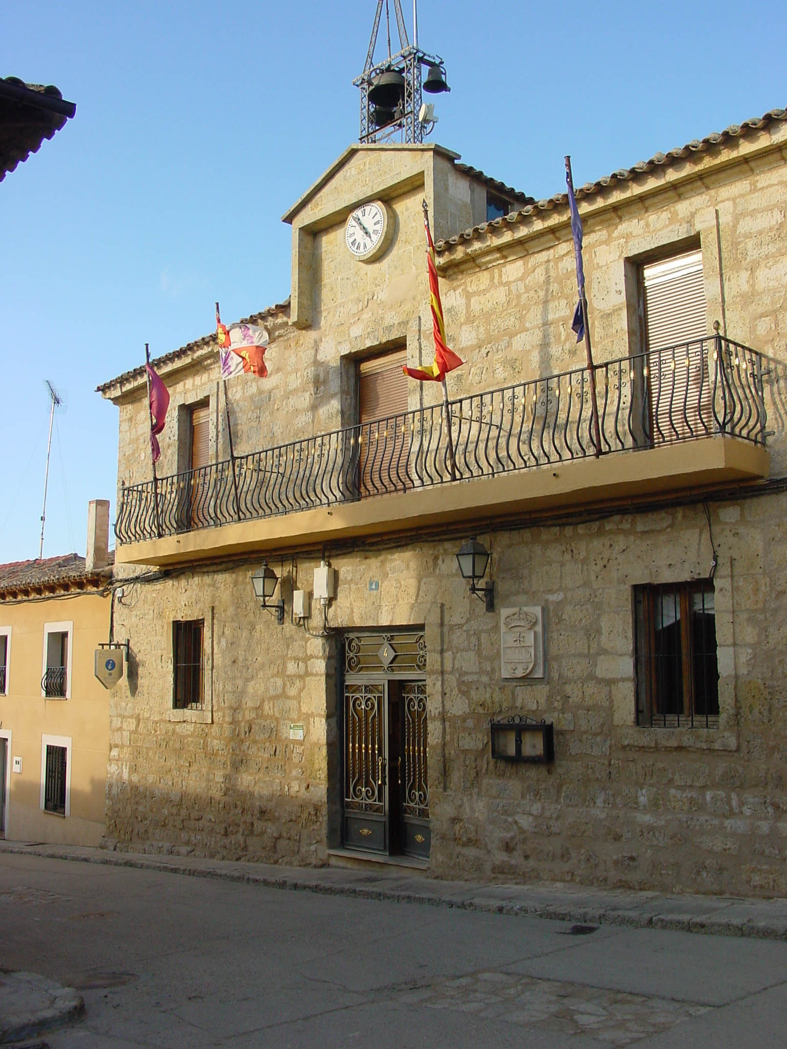 Ayuntamiento de Villalba de los Alcores en la provincia de Valladolid, España.